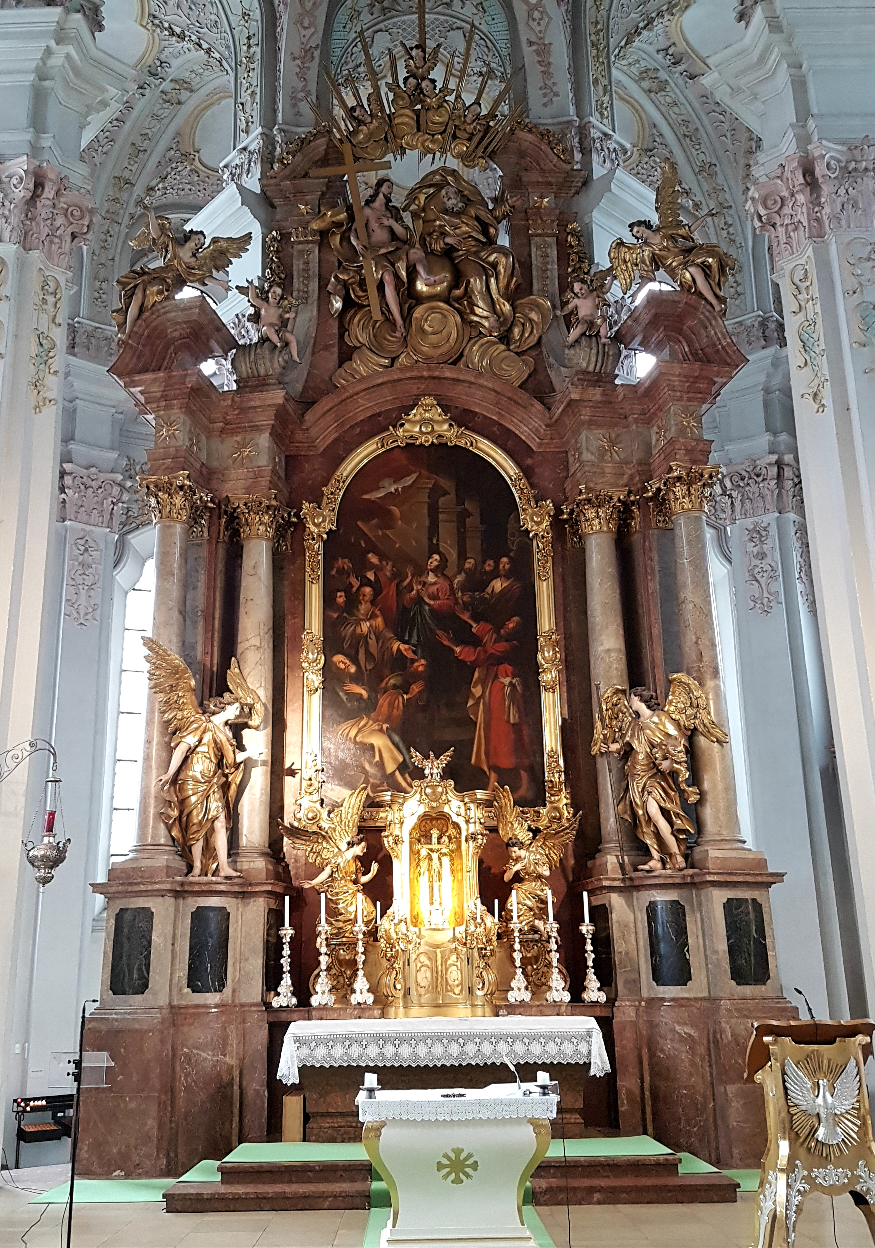 Hl. Geist-Kirche München, Hochaltar (Frührokoko)